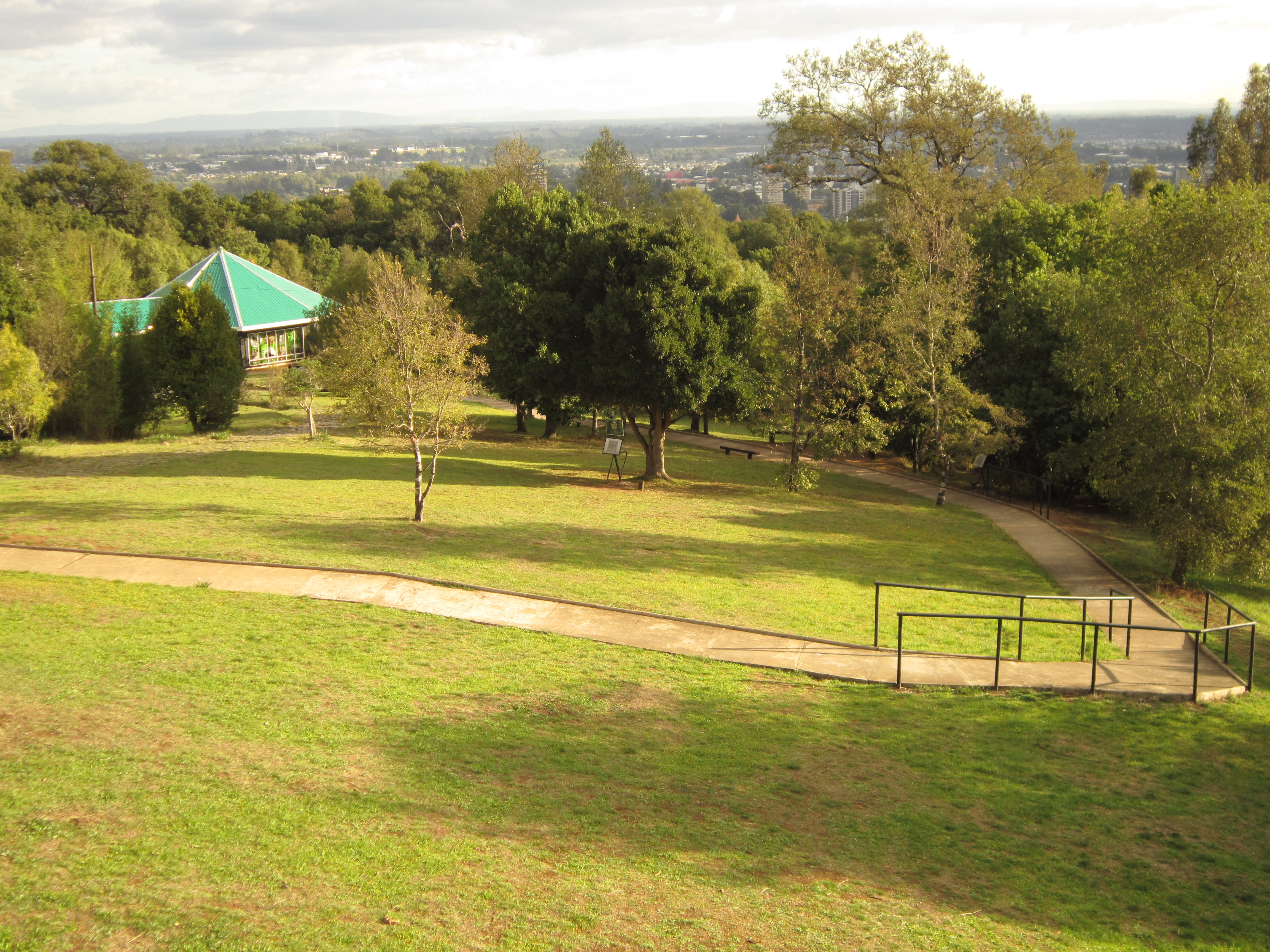 explanada del centro ambiental del cerro Ñielol, donde se otorga información al visitante.